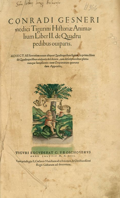 Frontispice de Historiae animalium : Liber II de quadrupedibus oviparis (1554)